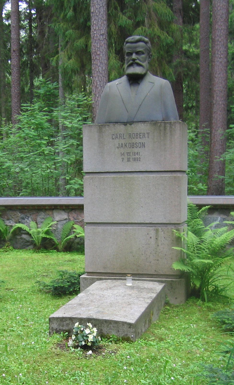 Carl Robert Jakobsoni hauamonument.Foto: Robert Treufeldt, 25. juuni 2015